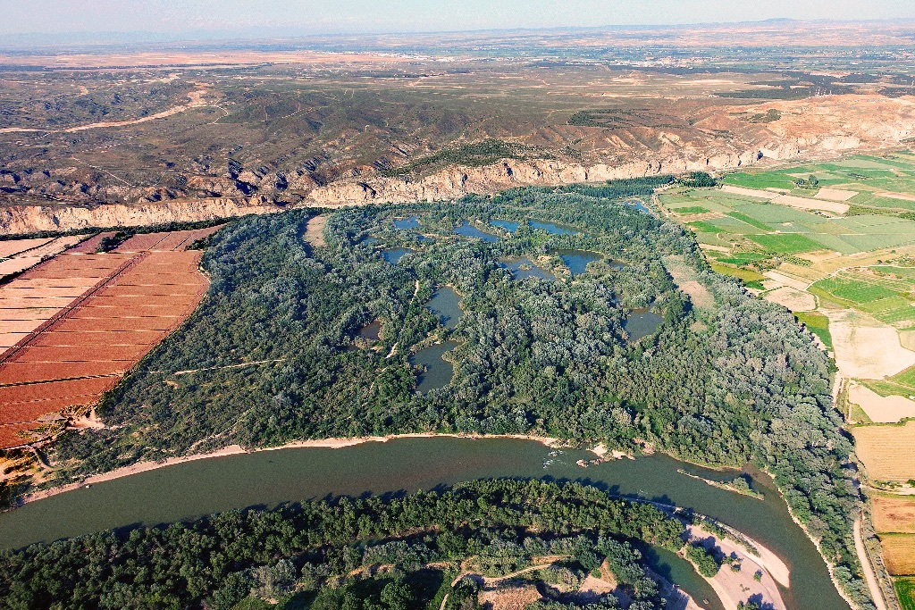 Imagen aérea del meandro abandonado del Ebro, que constituye el espacio natural del Galacho de Juslibol.